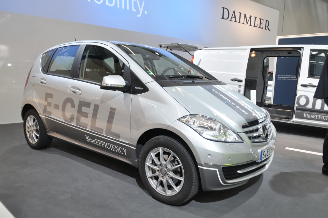 Messe i-Mobility 2012 in Stuttgart Dieses Foto entstand durch Unterstützung des gemeinnützigen Vereins Skillshare.eu Skillshare e.V. ist ein eingetragener gemeinnütziger Verein zur Förderung der Bildung durch Unterstützung der Erstellung, Sammlung und Verbreitung so genannten freien Wissens. IBAN: DE16 8306 5408 0004 8850 66 BIC: GENODEF1SLR Bank: VR-Bank Altenburger Land